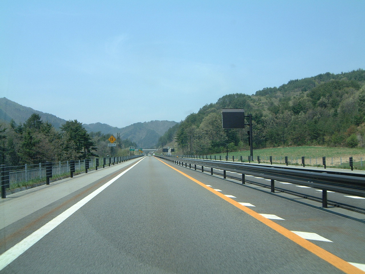 中部縦貫自動車道（高山清見道路） 高山西インターチェンジ付近（上り方面から撮影） 2007年 投稿者が撮影